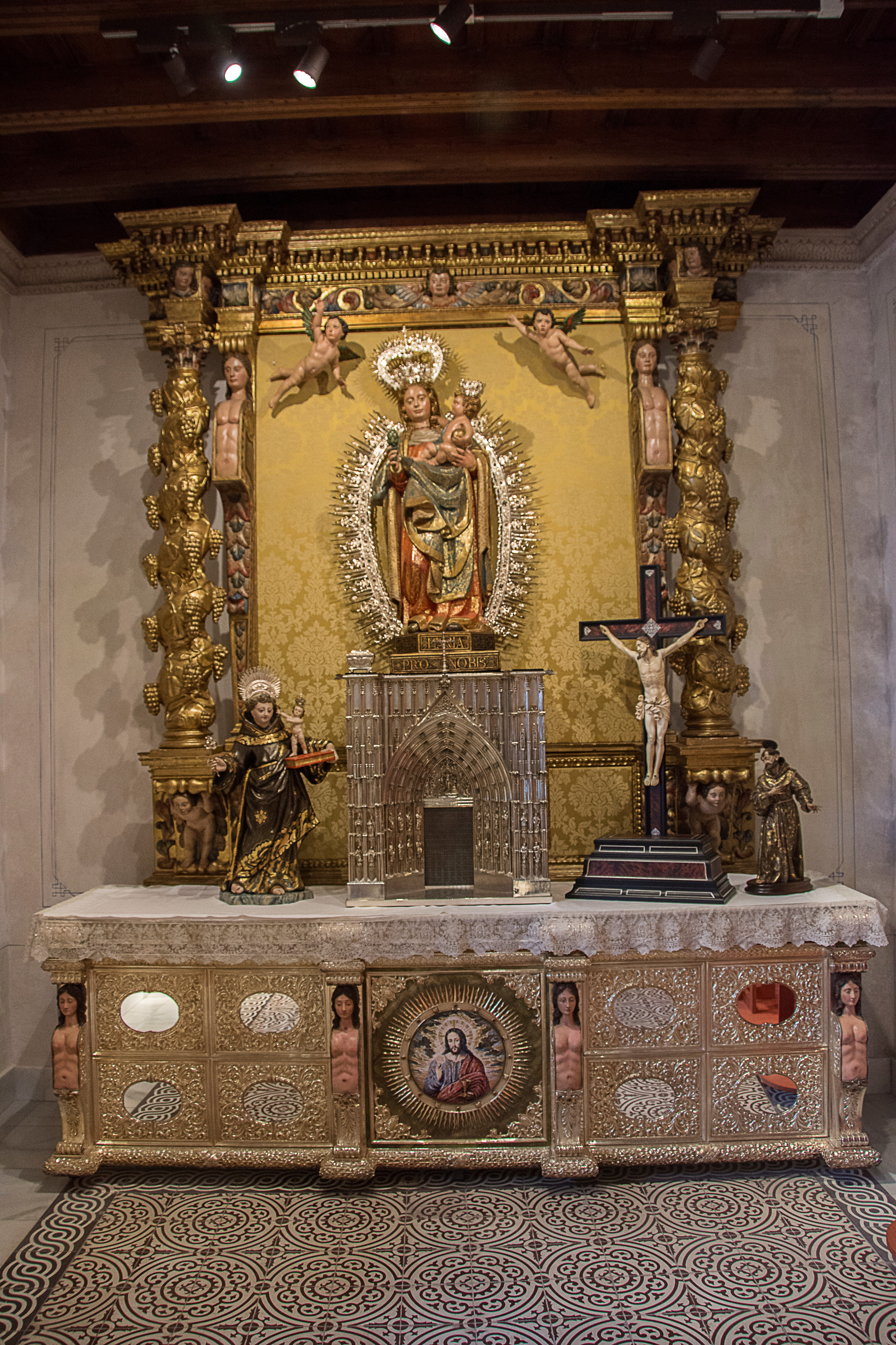 Virgen de la alcachofa. Siglo XVI. Autor anónimo (Escuela Castellana). Colección Mariano Bellver. Sevilla, (España).